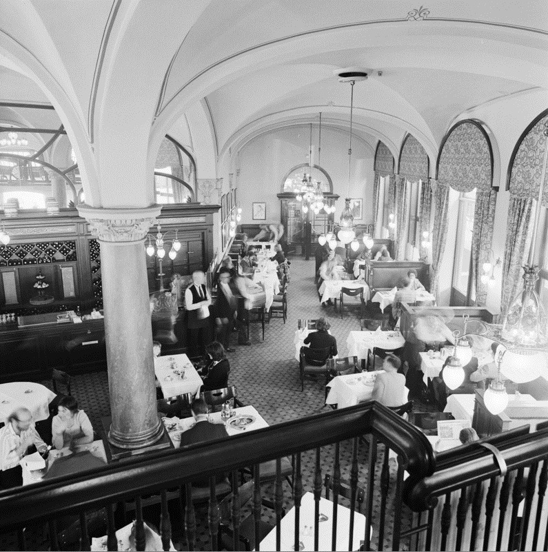 Hotel Continental, interiør, restaurant Theatercafeen, gjester, servitører.